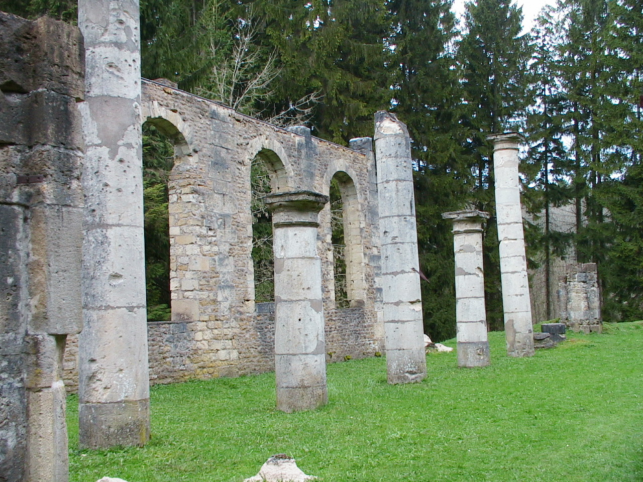 Ruines de l'église d'Ornes (55), village détruit pendant la guerre de 14 Object location49° 15′ 09.64″ N, 5° 28′ 01.98″ E Photo prise le 17/04/2006 par F5ZV Licensing Catégorie:Image de commune de la Meuse